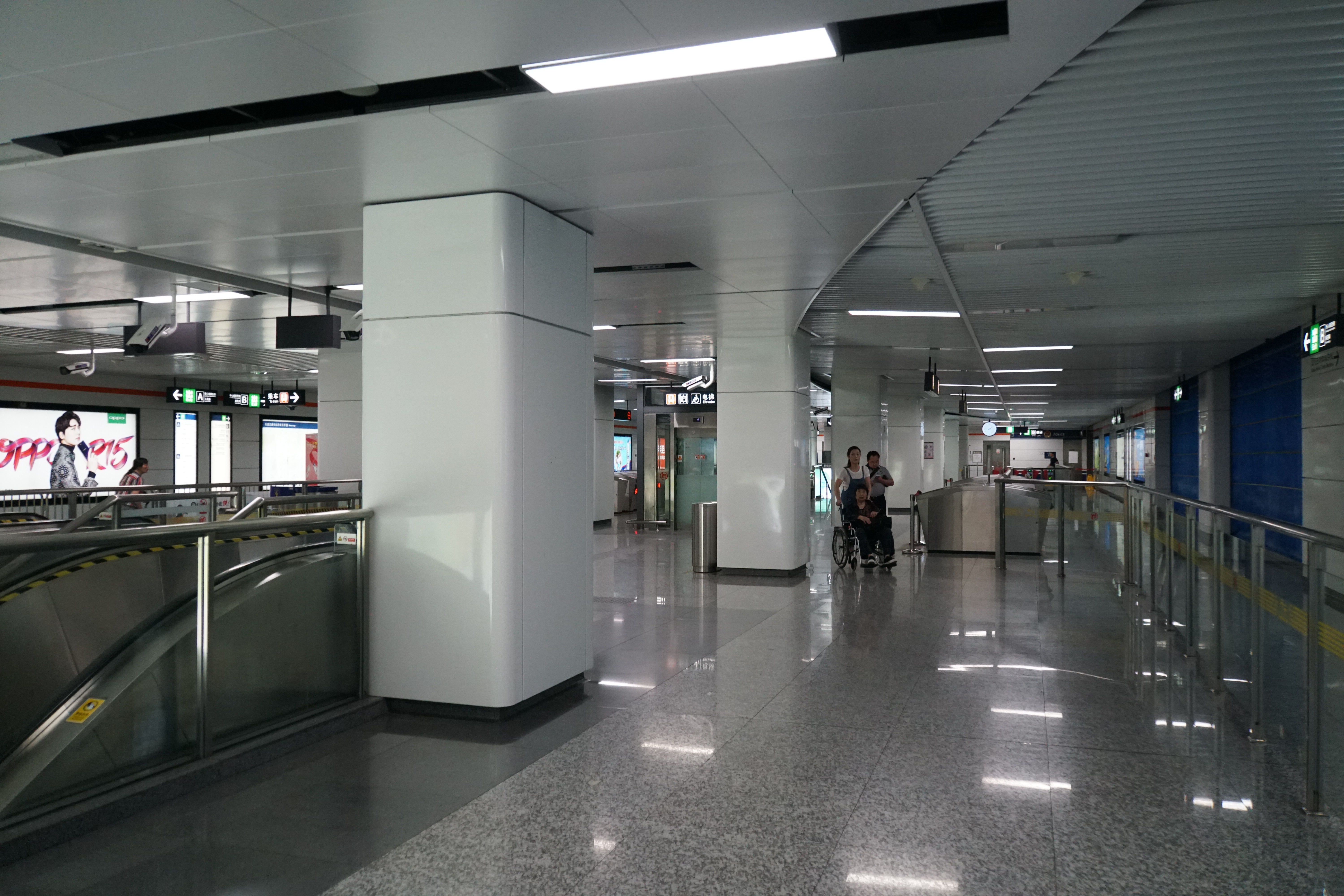 人民路站站厅